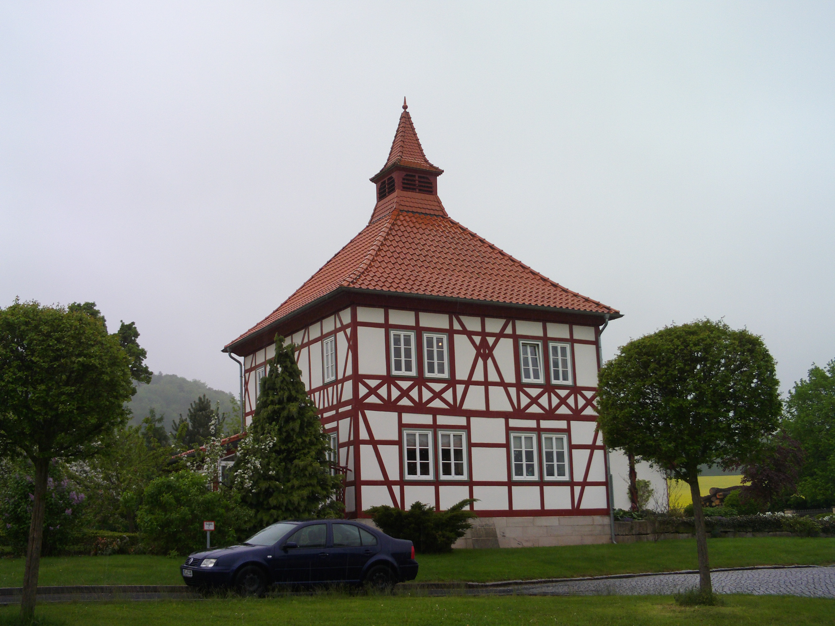 Alte Dorfschule in Breckenrode.Später war es auch Kindergarten. Schöne Erinnerung an meine Kindheit...